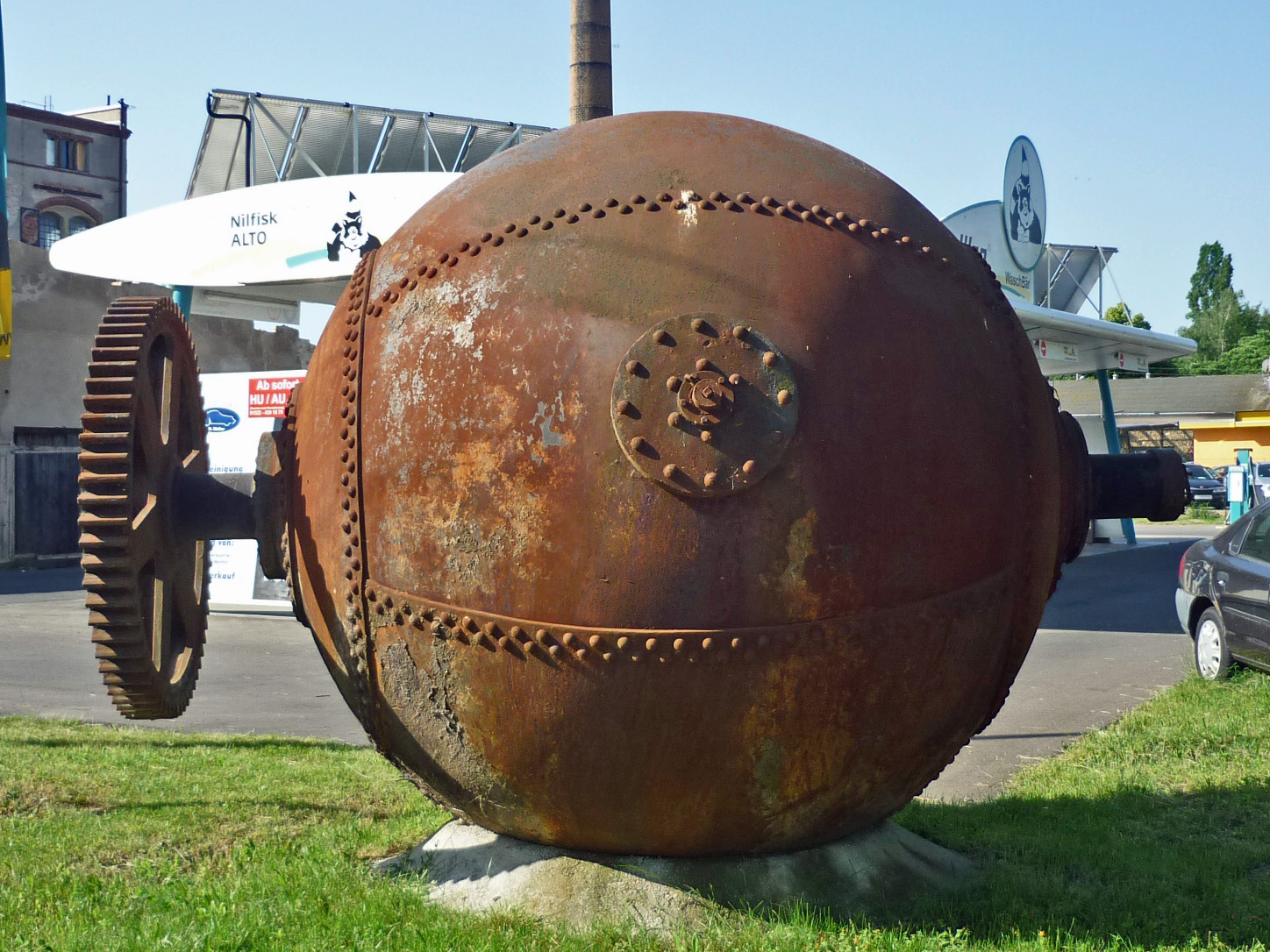 Kugeldrehkocher Baujahr 1904 zum Zerkleinern und Mischen von Rohstoffen für die Papierherstellung in der ehemaligen Fa. Otto Kaufmann in Niedersedlitz, Bahnhofstraße. Ausgestellt auf dem Gewerbehof Bismarckstraße 57